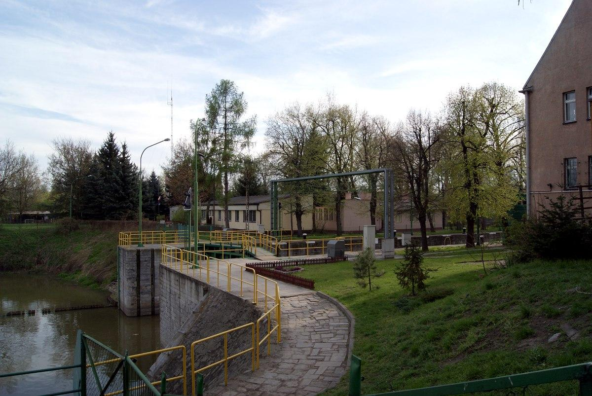 Śluza Szczytniki (stanowisko dolne).